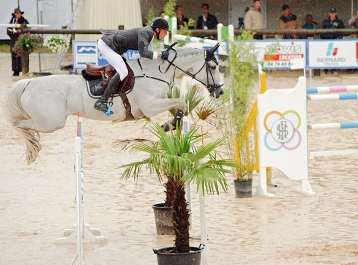 Kevin Staut et Silvana*HDC, lors du Grand Prix du CSI-4* de Bourgs-en Bresse.